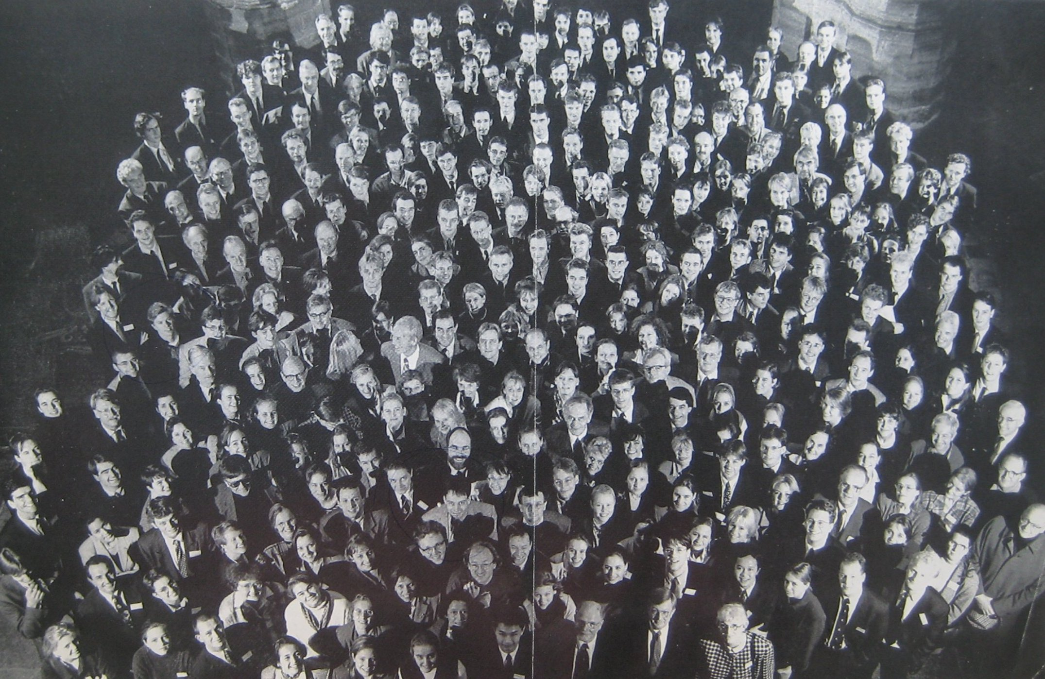 Groepsfoto van de Veerstichting in 1994